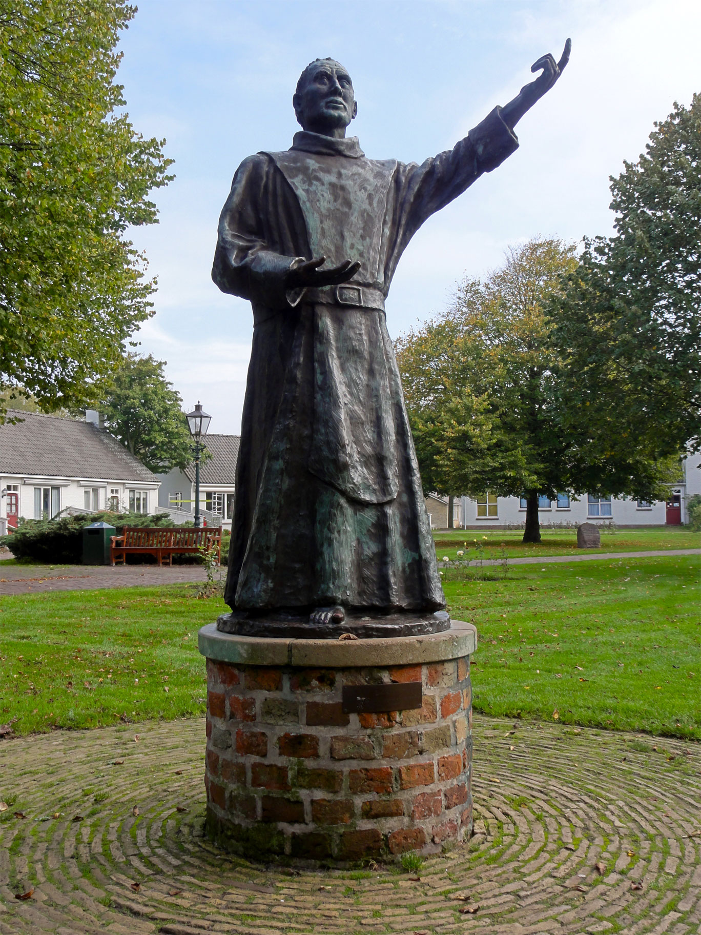 "De Schiere Monnik" aan de Willemshof in Schiermonnikoog door Martin van Waning(1887-1972)